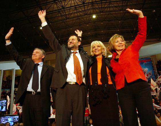 Joaquín Ramírez y Mariano Rajoy en un acto público